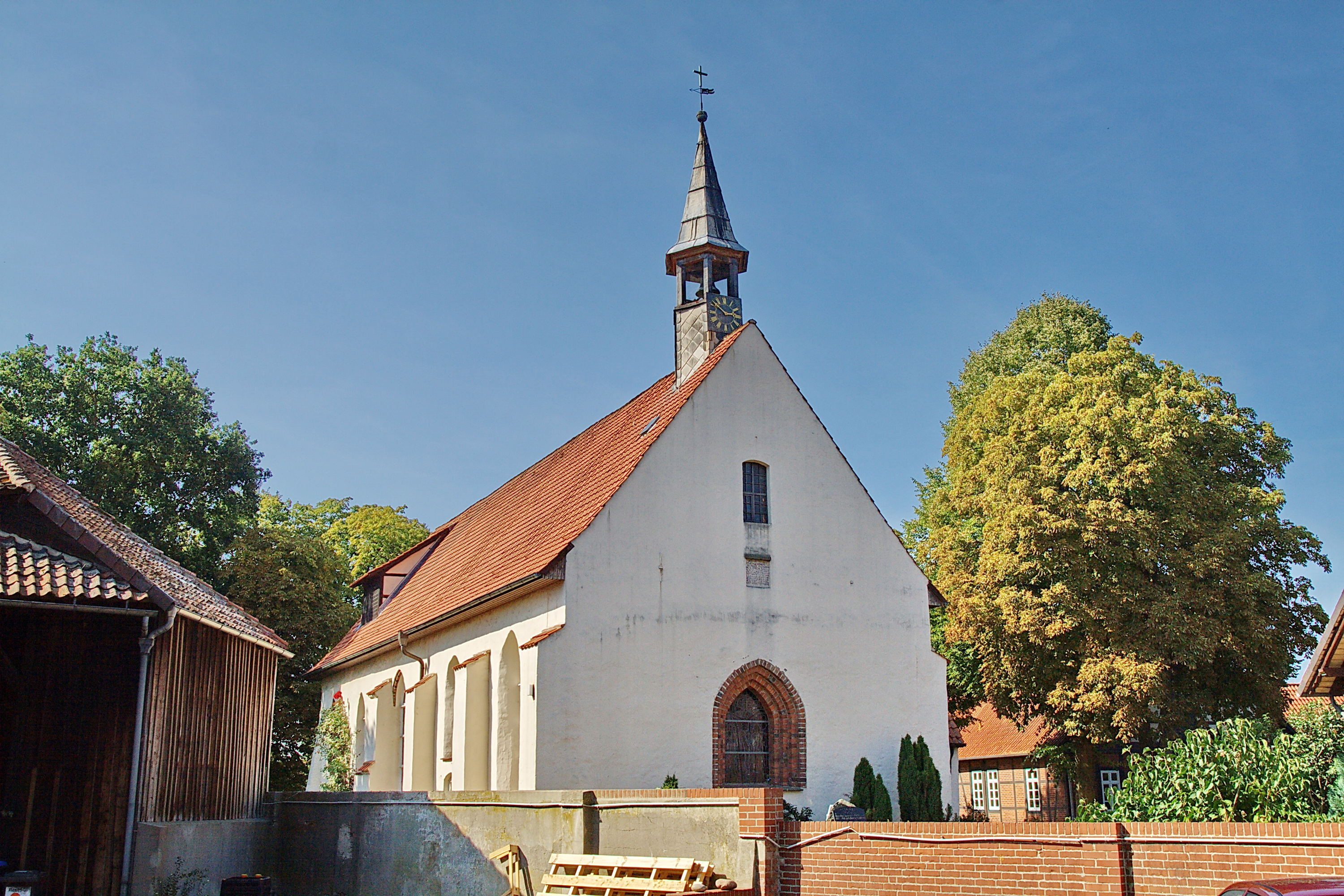 Kirche in Bröckel, Niedersachsen, Deutschland.